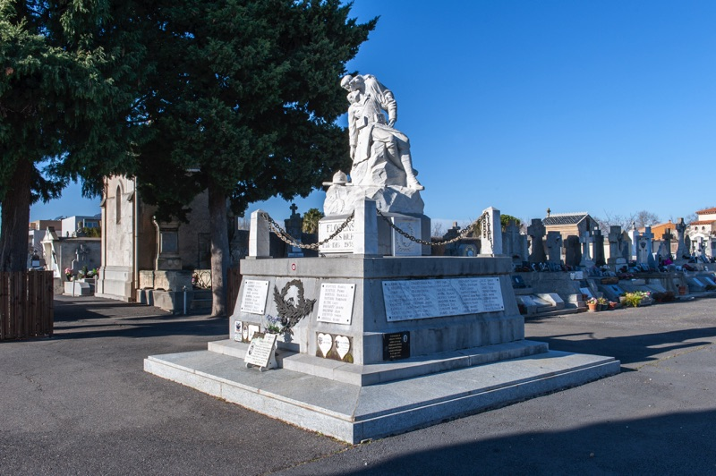 Monument aux morts - Archives départementales de l’Hérault - FRAD034-2458W-Florensac-00002